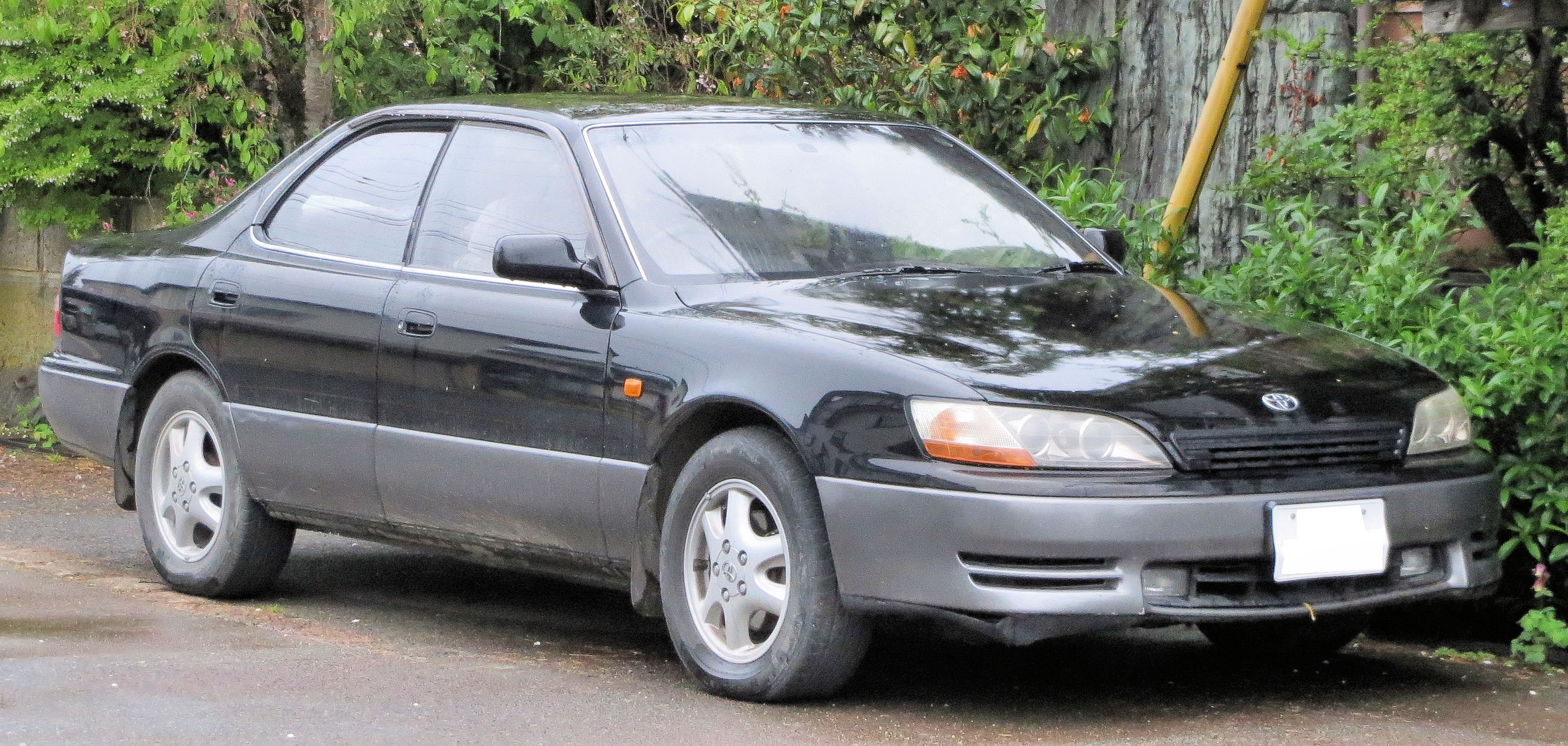 トヨタウィンダム3.0 VCV10